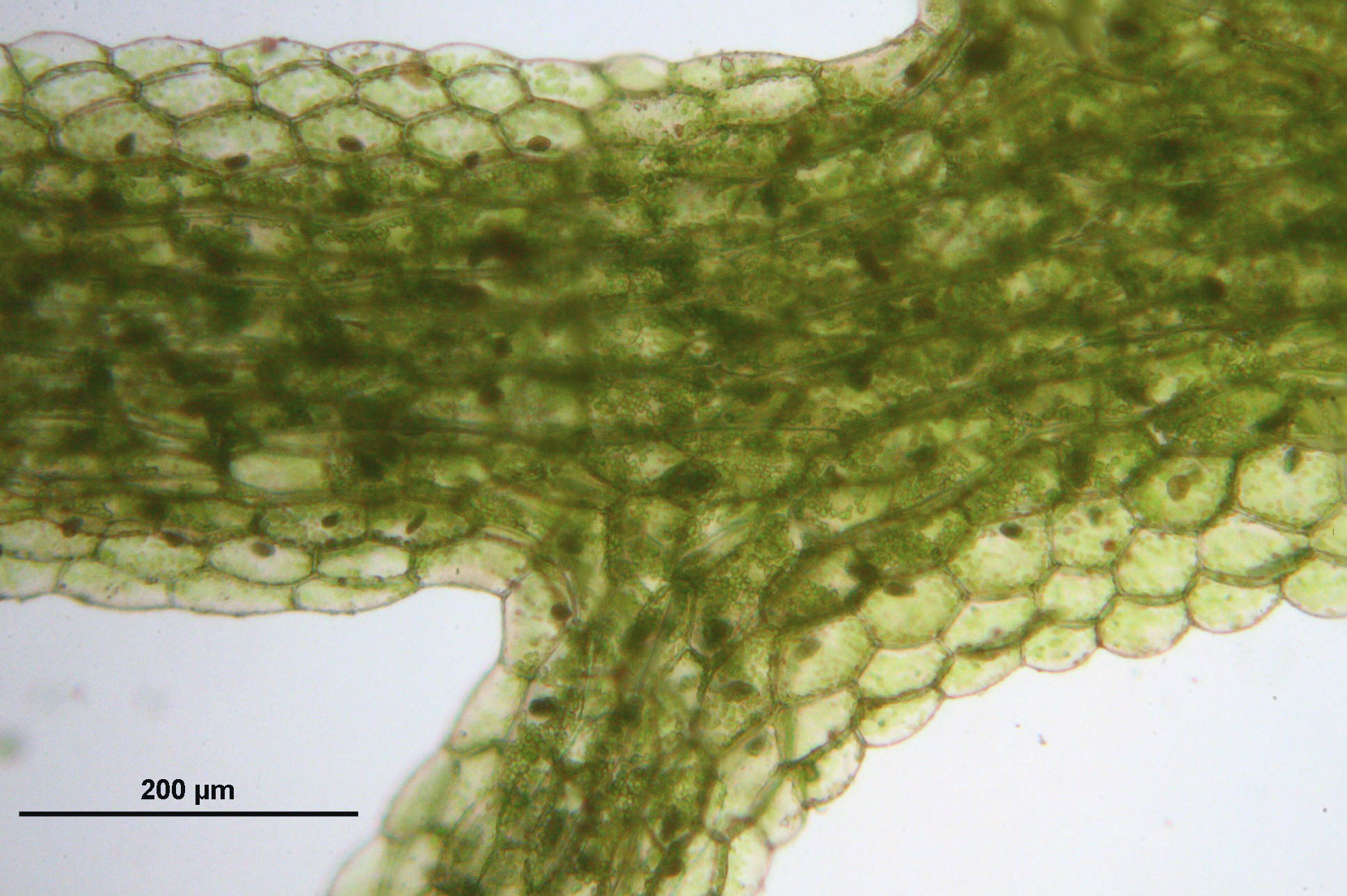 Vielspaltiges Riccardimoos (Riccardia multifida), Mikroskopaufnahme eines Thallus-Ausschnittes